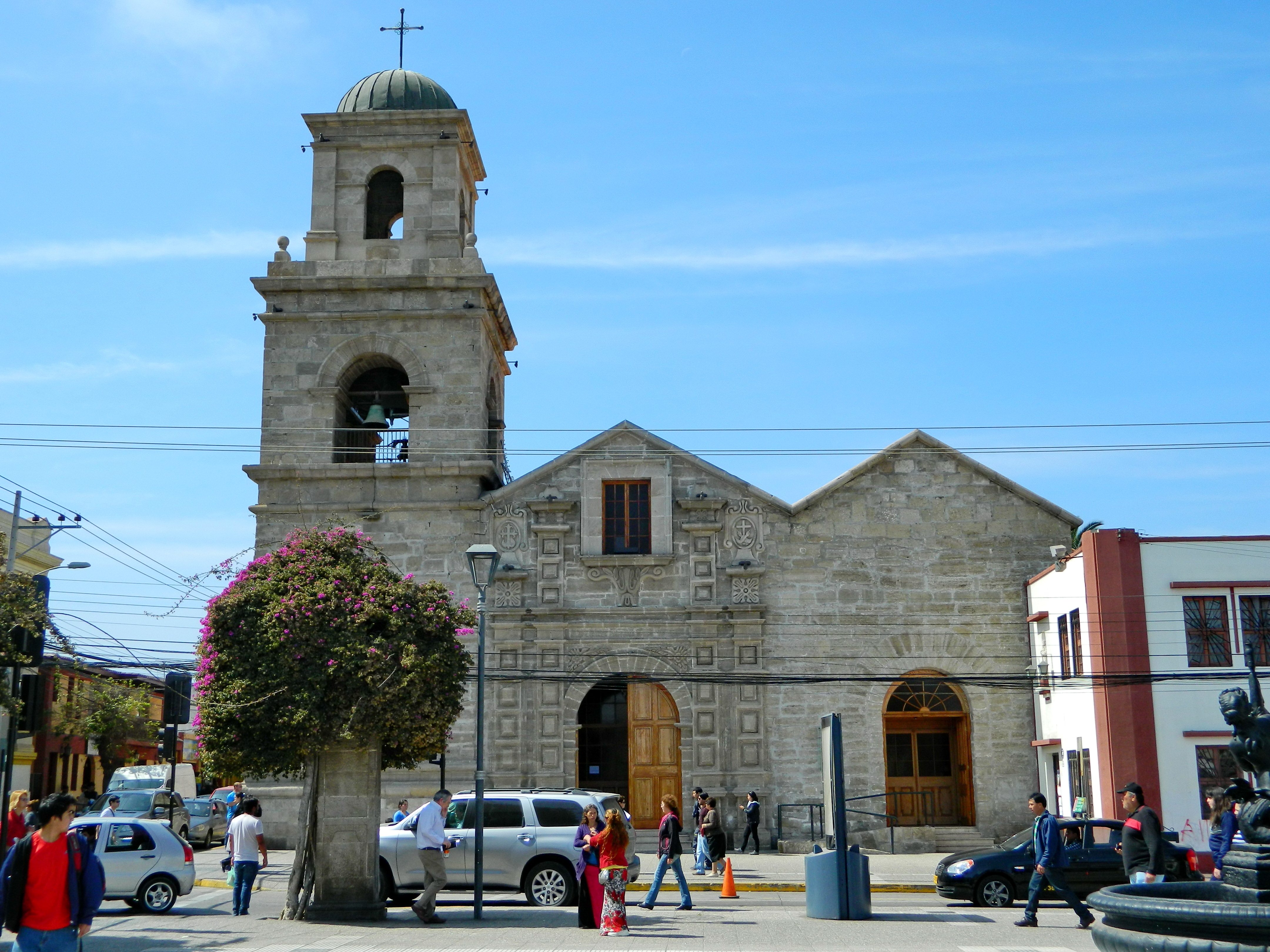 Iglesia de San Francisco de La Serena This is a photo of a national monument in Chile: 596